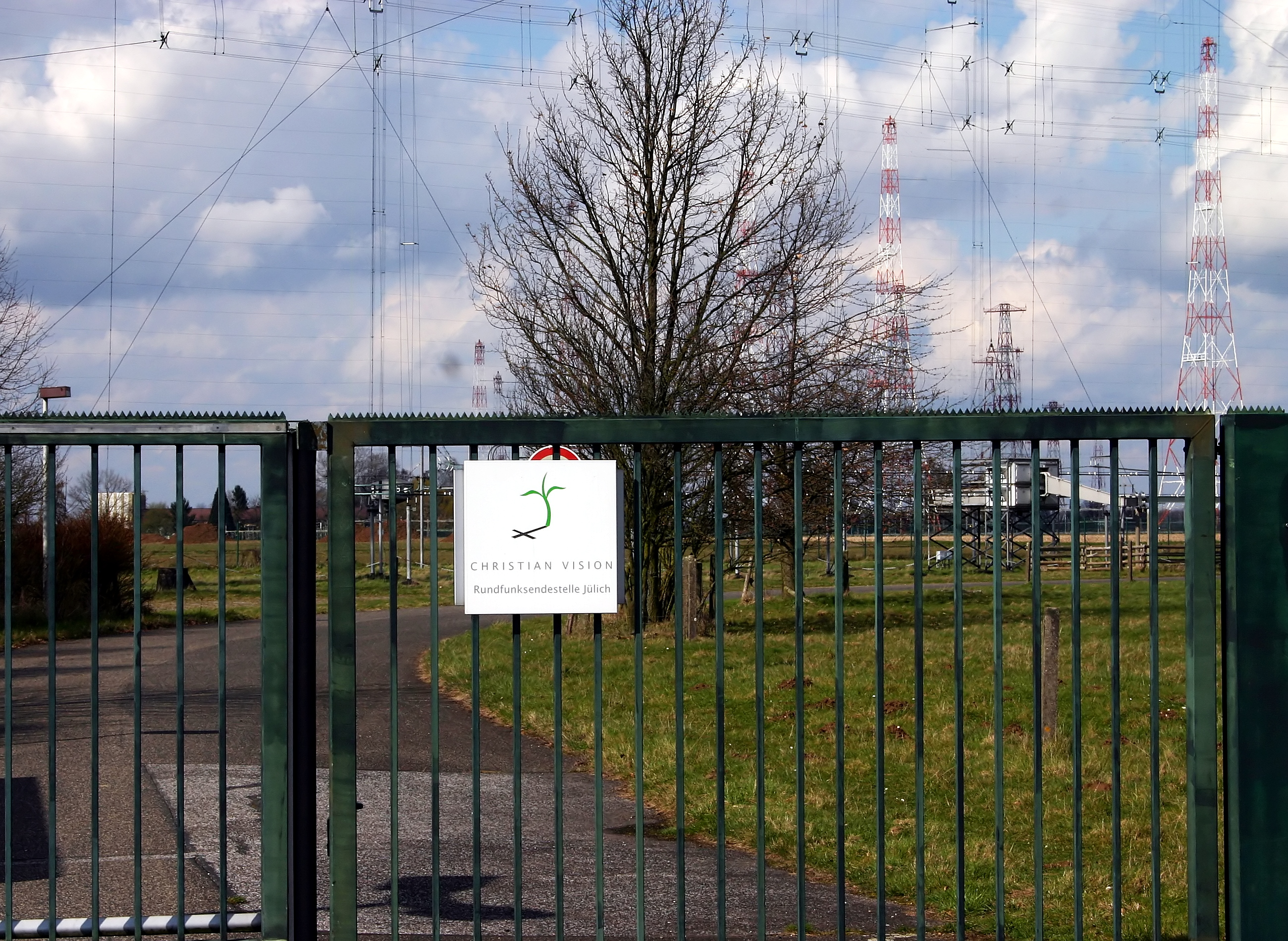 Kurzwellenzentrum Jülich. Zum 1. Januar 2008 wurde die Sendeanlage von T-Systems an die religiöse Sendeanstalt CVC / Christan Vision übergeben und im Laufe des Jahres 2010 abgerissen.